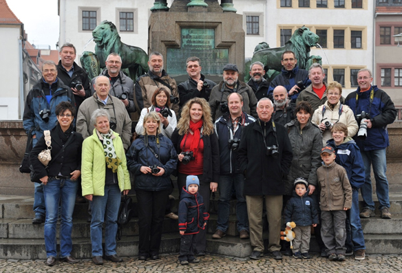 Die Freiberger Fotofreunde vor dem Brunnendenkmal Ottos des Reichen auf dem Freiberger Obermarkt, 2010. Fotograf: Eckardt Mildner